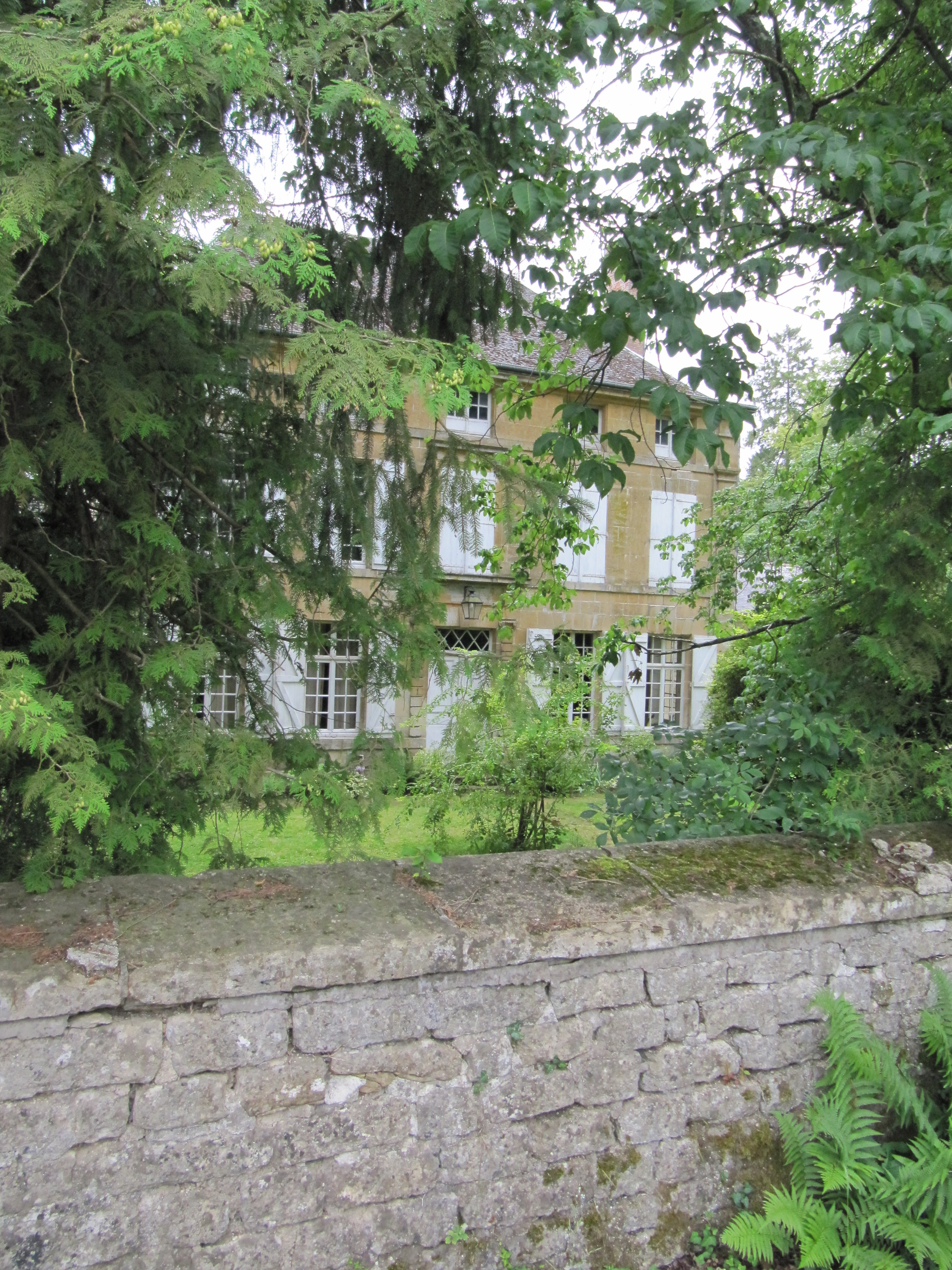 Château de Gruyères vue de la rue principale du village - façade Ouest 3 - Gruyères Ardennes France